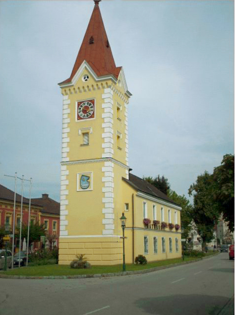 Rathaus Wallsee, Standort der ehemaligen Principia des römischen Kohortenkastells